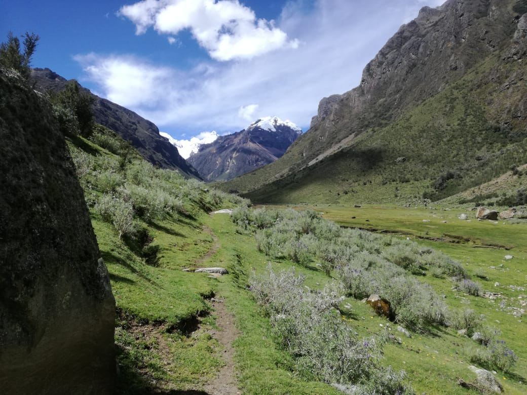 Nevado Andavite (o Chawpirahu) al centro, desde el oeste en la quebrada Quilcayhuanca. Foto tomada en julio de 2019 en Áncash, Perú.